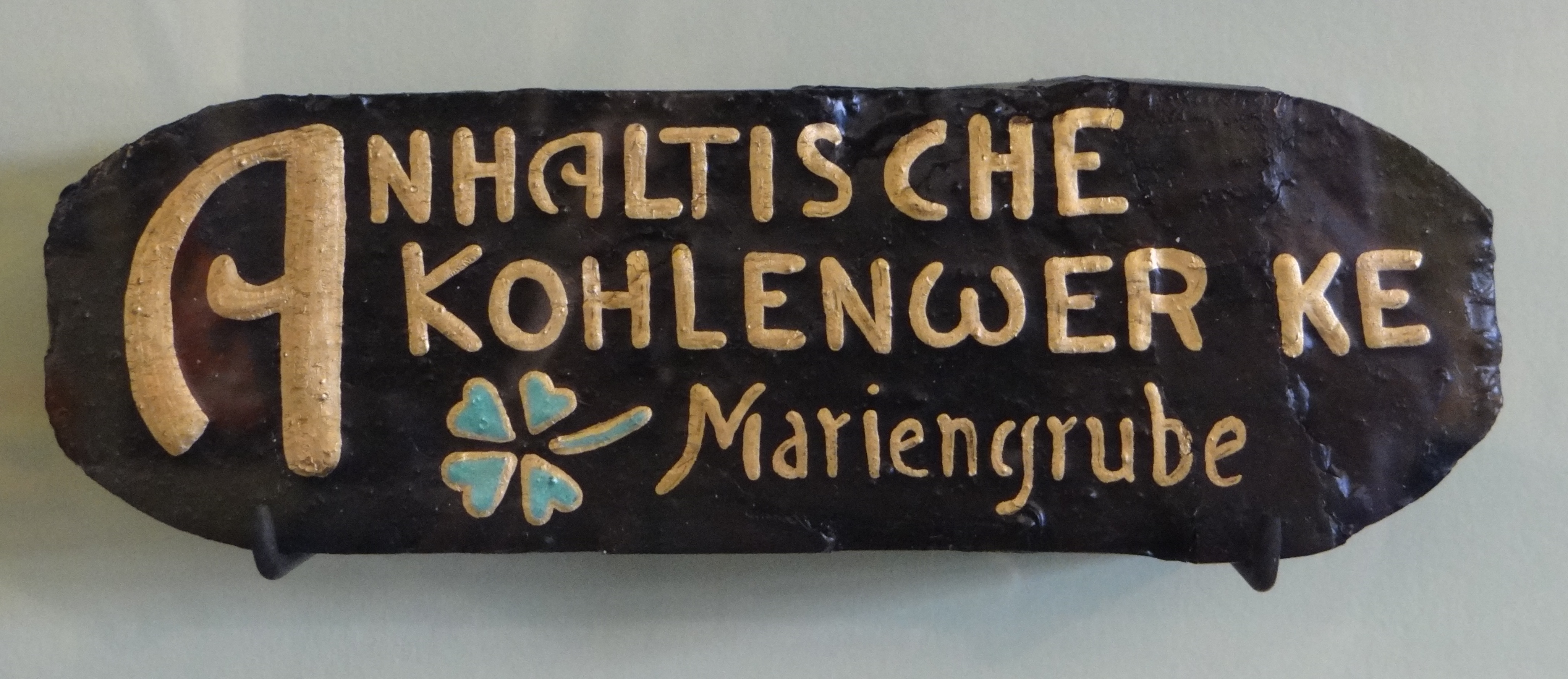 Deutsches Bergbau-Museum Bochum. Halle 19: Aufbereitung und Rohstoffveredlung. Kohlebrikettierung: Schmuckbriketts